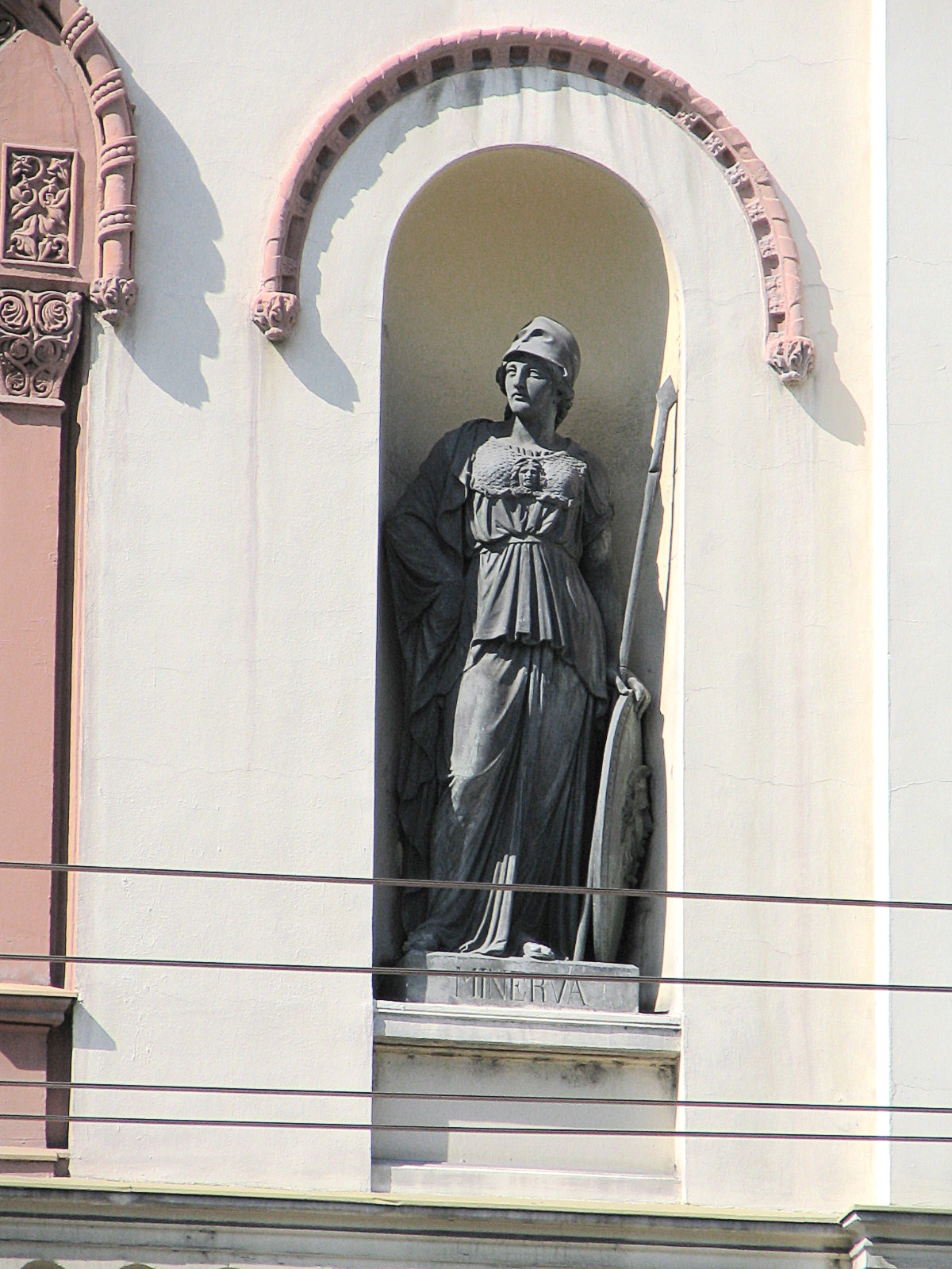 Богиња Минерва у ниши на фасади Капетан Мишиног здања (фото: Михаило Грбић, 14.5.2005.)